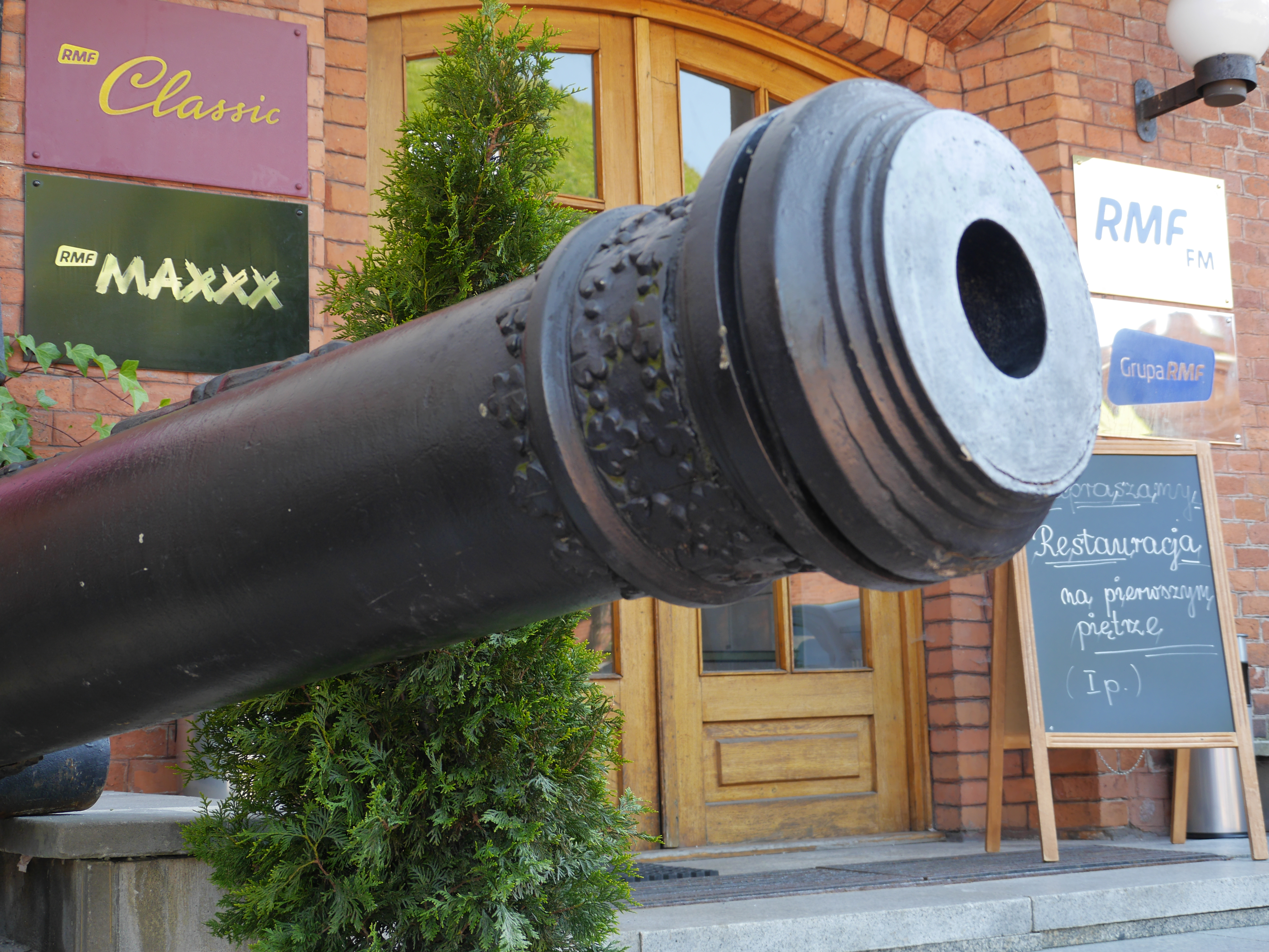 Siedziba radia RMF FM, al. Waszyngtona 1, 30-204 Kraków This photo was taken with Panasonic Lumix DMC-GH3 camera, thanks to Panasonic. You can see all photographs in category: Taken with Panasonic Lumix DMC-GH3.